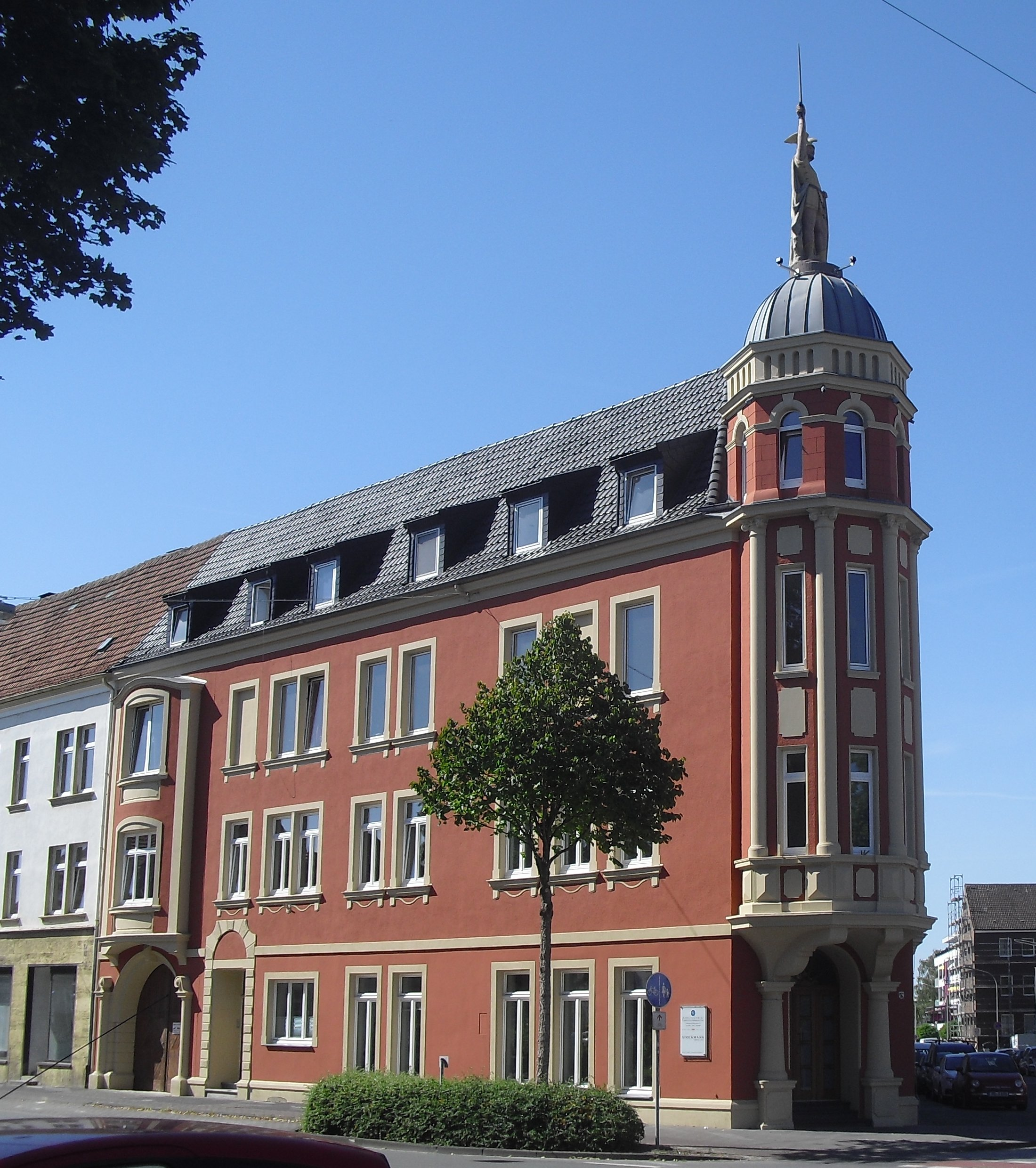 Detmolder Straße 31, Paderborn This is a photograph of an architectural monument.